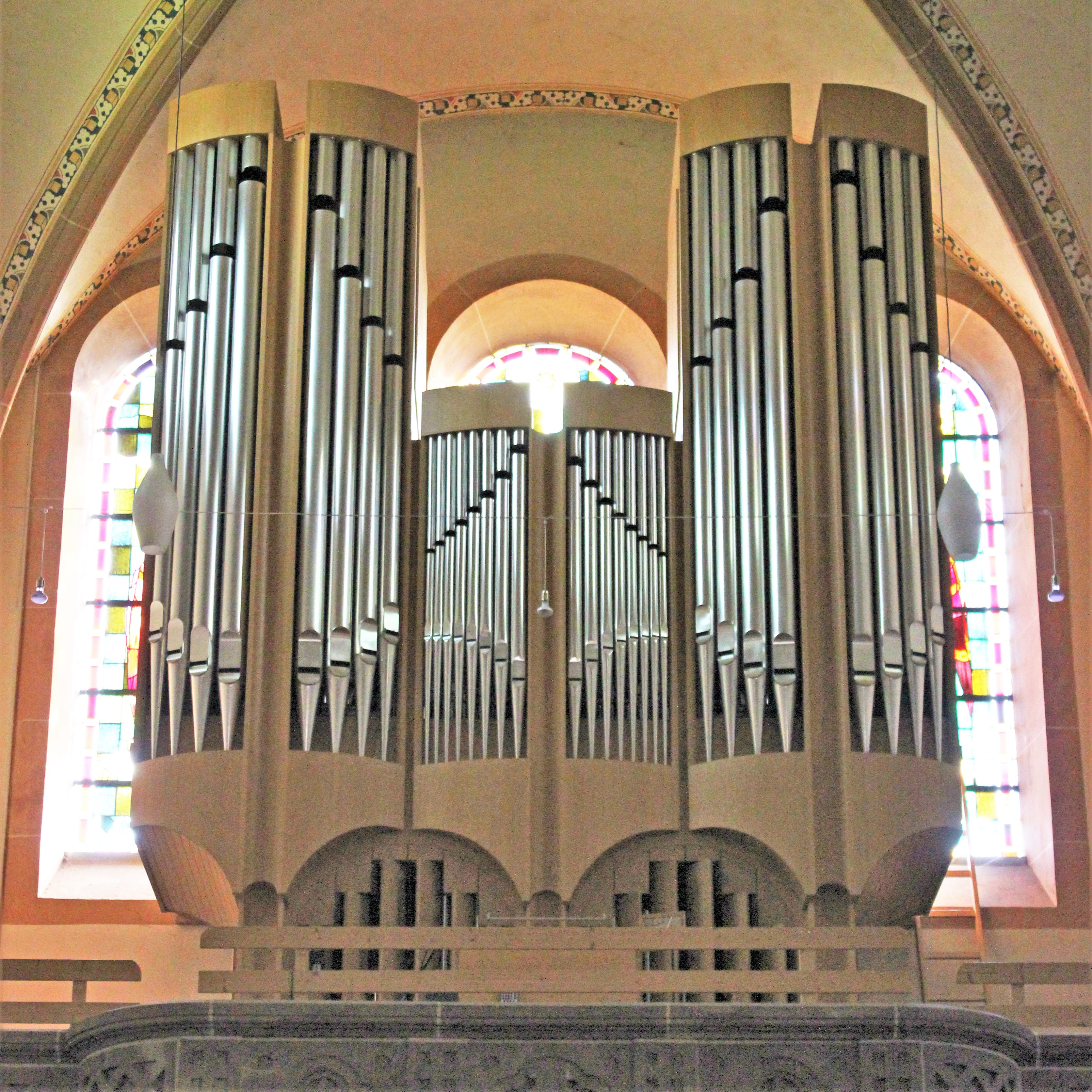 Orgelprospekt der katholischen Pfarrkirche St. Mauritius in Fremersdorf, einem Ortsteil der Gemeinde Rehlingen-Siersburg, Landkreis Saarlouis, Saarland